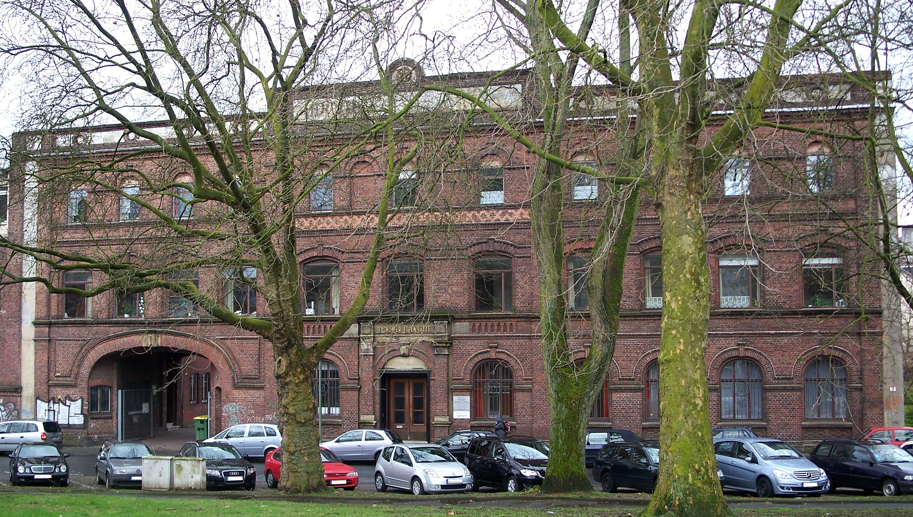 1899 errichtetes Verwaltungsgebäude der Bochumer Eisenhütte Heintzmann an der ehemaligen Blücherstraße in Bochum. Das Gebäude ist (Stand 2009) noch erhalten, die Blücherstraße ist heute die Stühmeyerstraße. Das Gebäude wurde am 21.12.1999 unter der Nr. A 505 in die Denkmalliste der Stadt Bochum eingetragen [1].